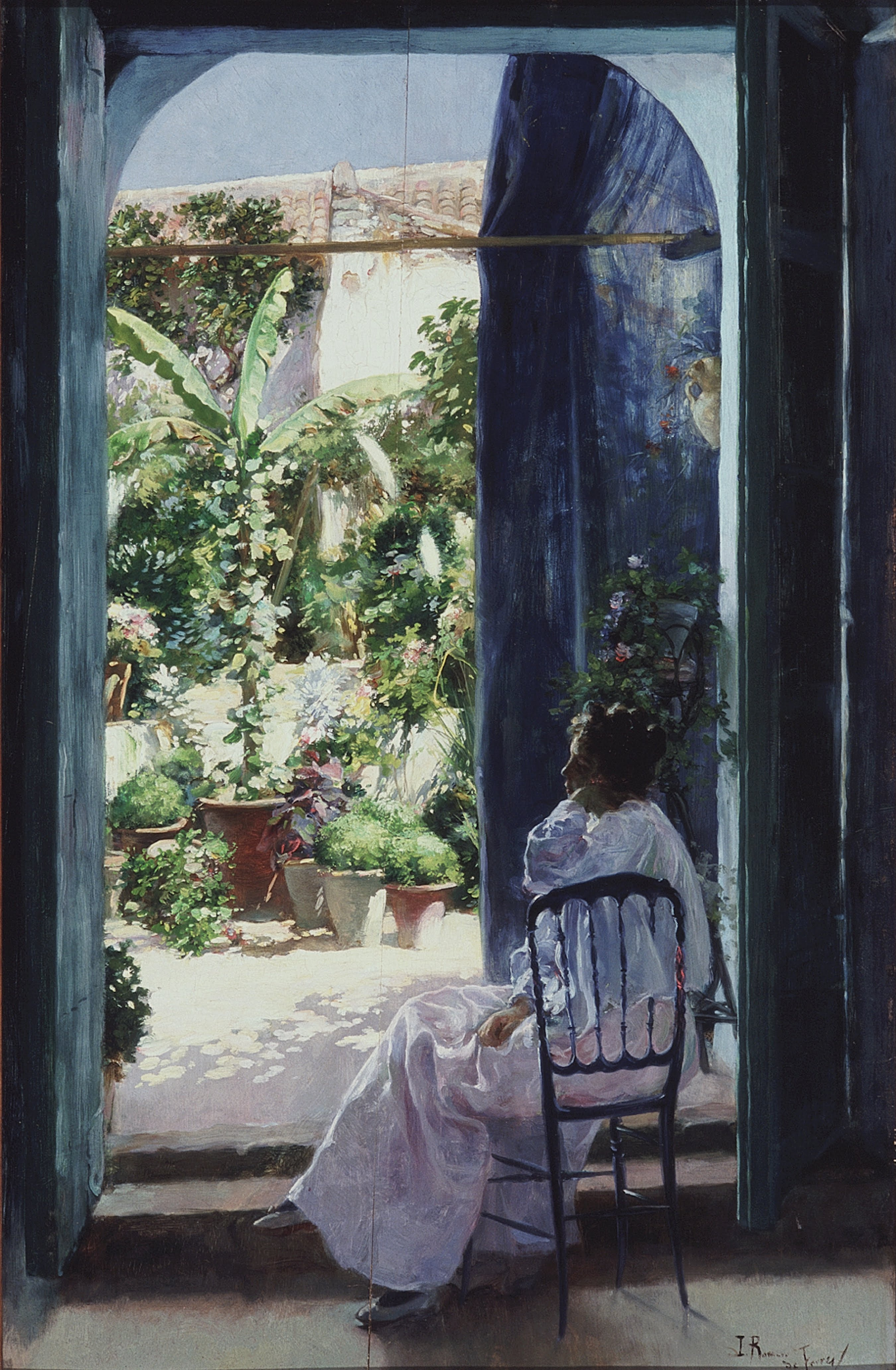 Pereza andaluza. Hacia 1900. Julio Romero de Torres. Óleo sobre tabla. 72,8 x 47,8 cm. Museo de Bellas Artes de Córdoba, (España).